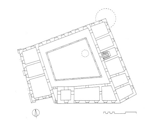 Tloris